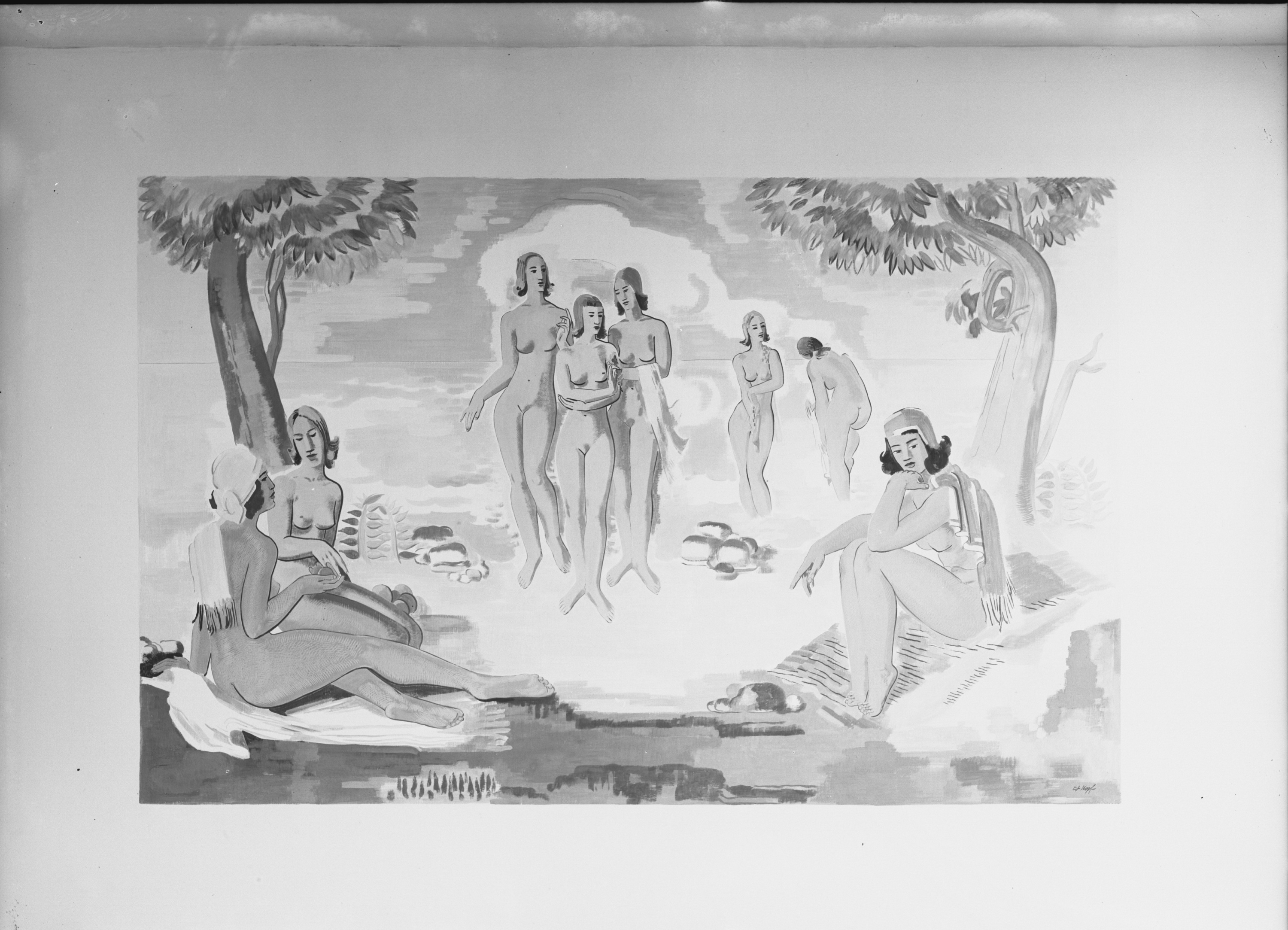 Schule Veddel (Hamburg-Veddel): Wandbild von Eduard Hopf SchumacherWV Nr. 277